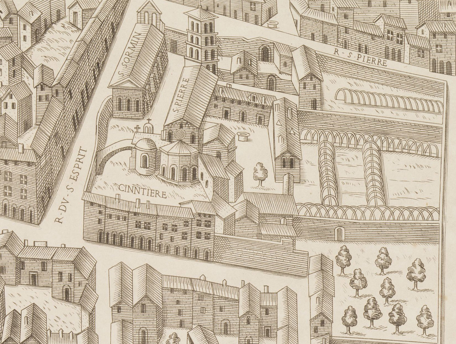 Détail du fac-similé de 1872-1876 de Le Plan scénographique de la ville de Lyon, c.1544-1553 montrant l'abbaye des Dames de Saint-Pierre vers 1550, archives municipales de la ville de Lyon